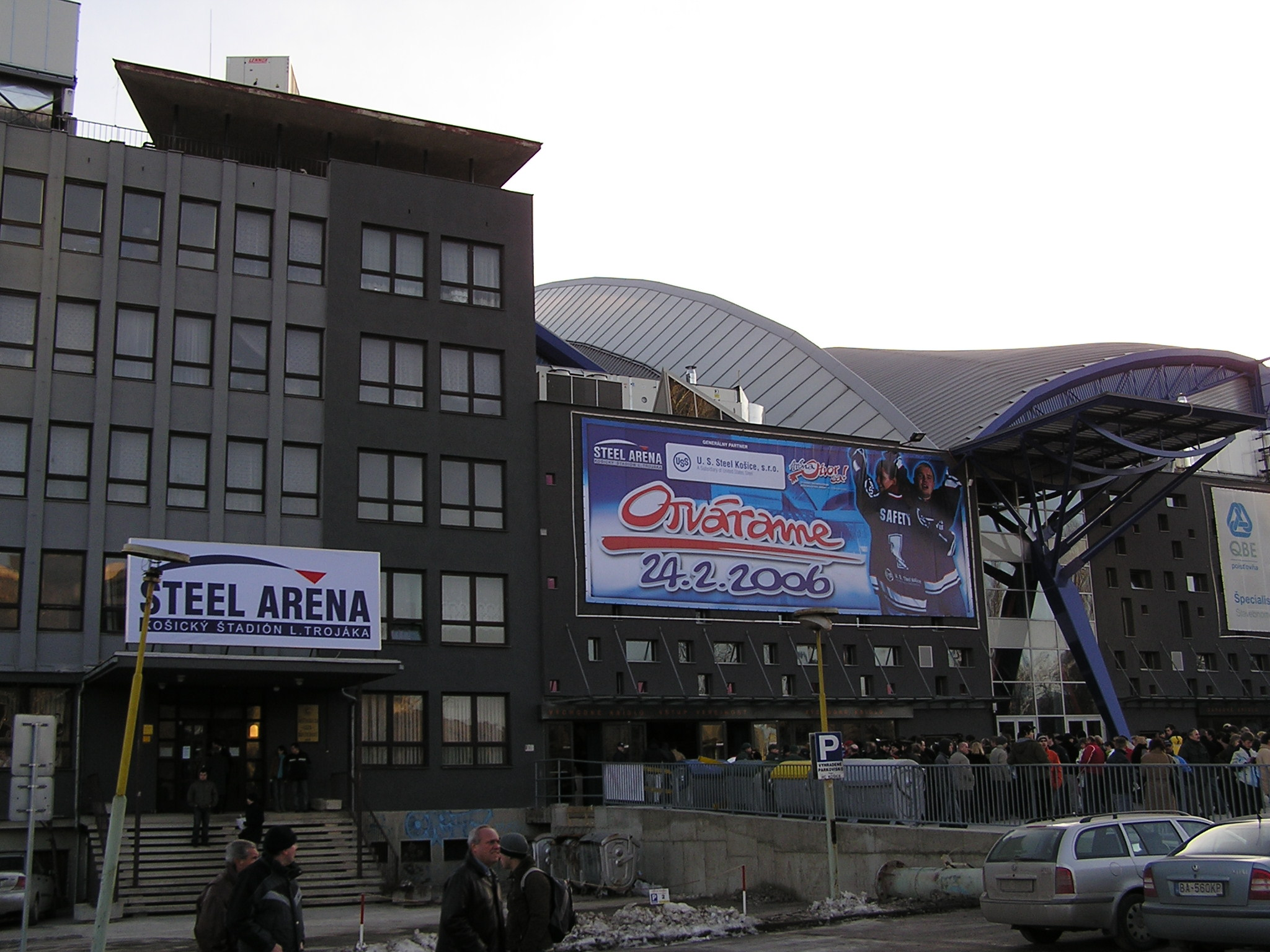 Steel Arena in Kosice, Autor: Marián Gladiš